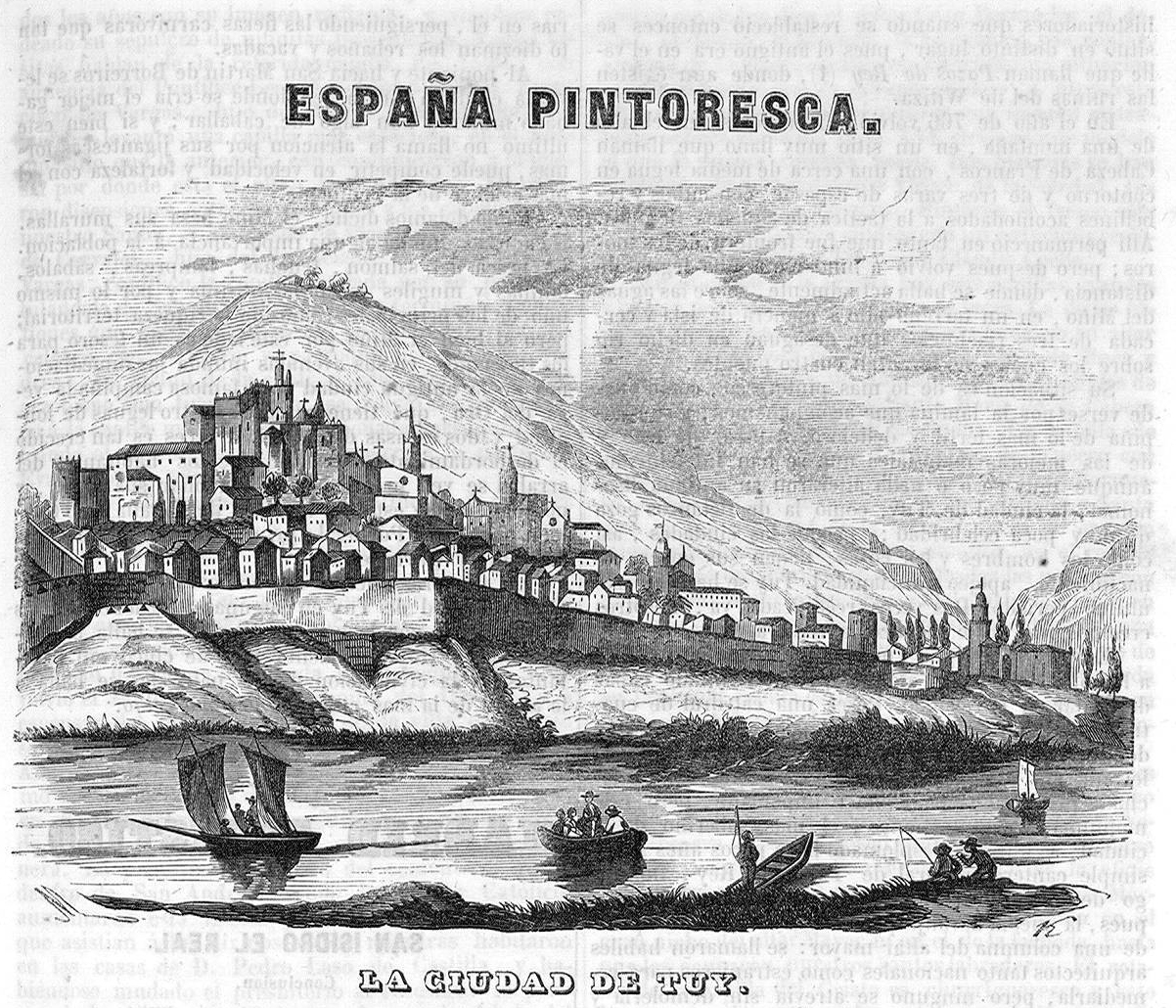 España pintoresca. La ciudad de Tuy.